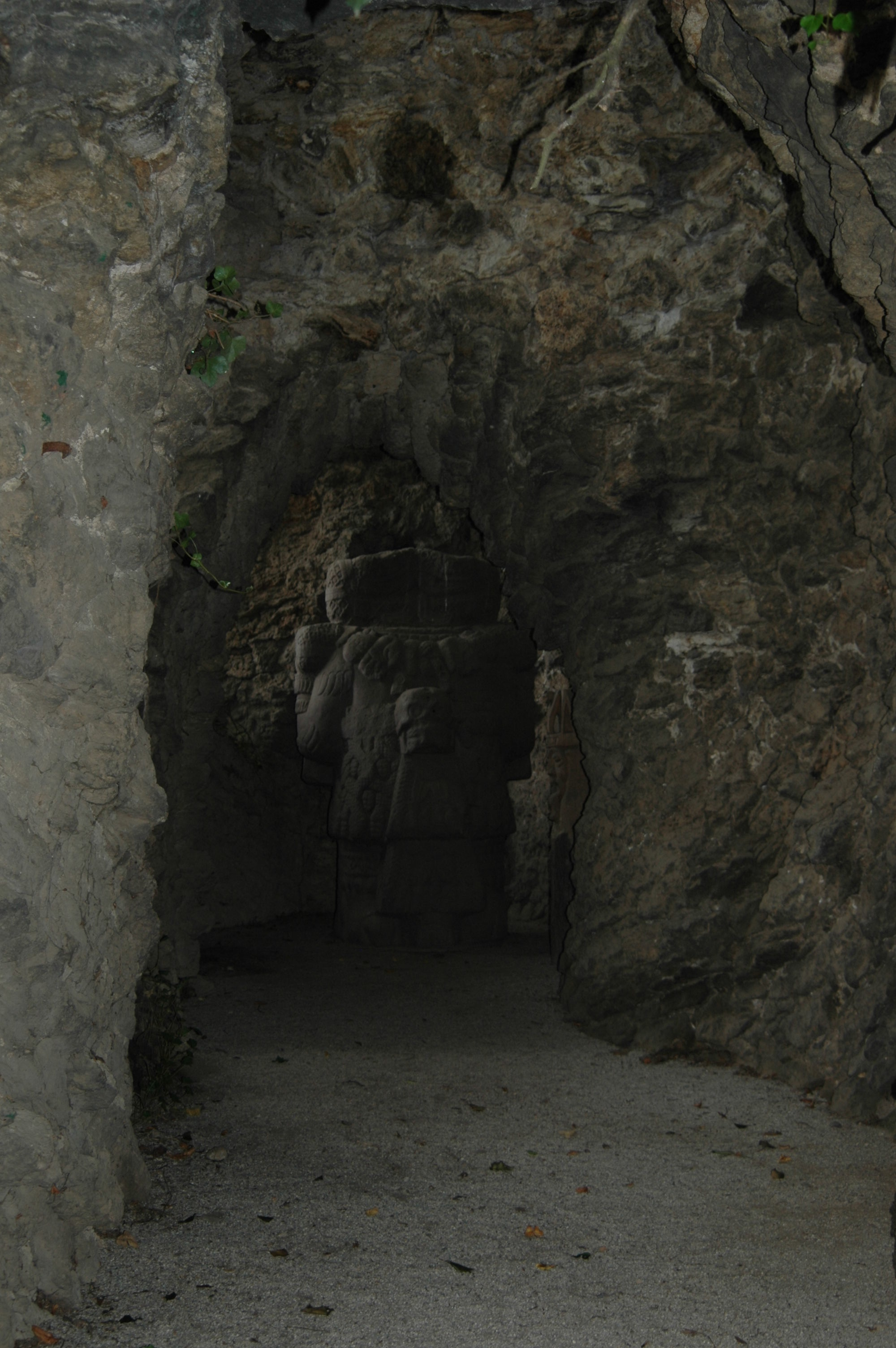 Grotte am Ende der inneren Rheinpromenade im Garten der Villa Hammerschmidt